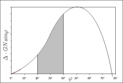 Eigen ontwerp.